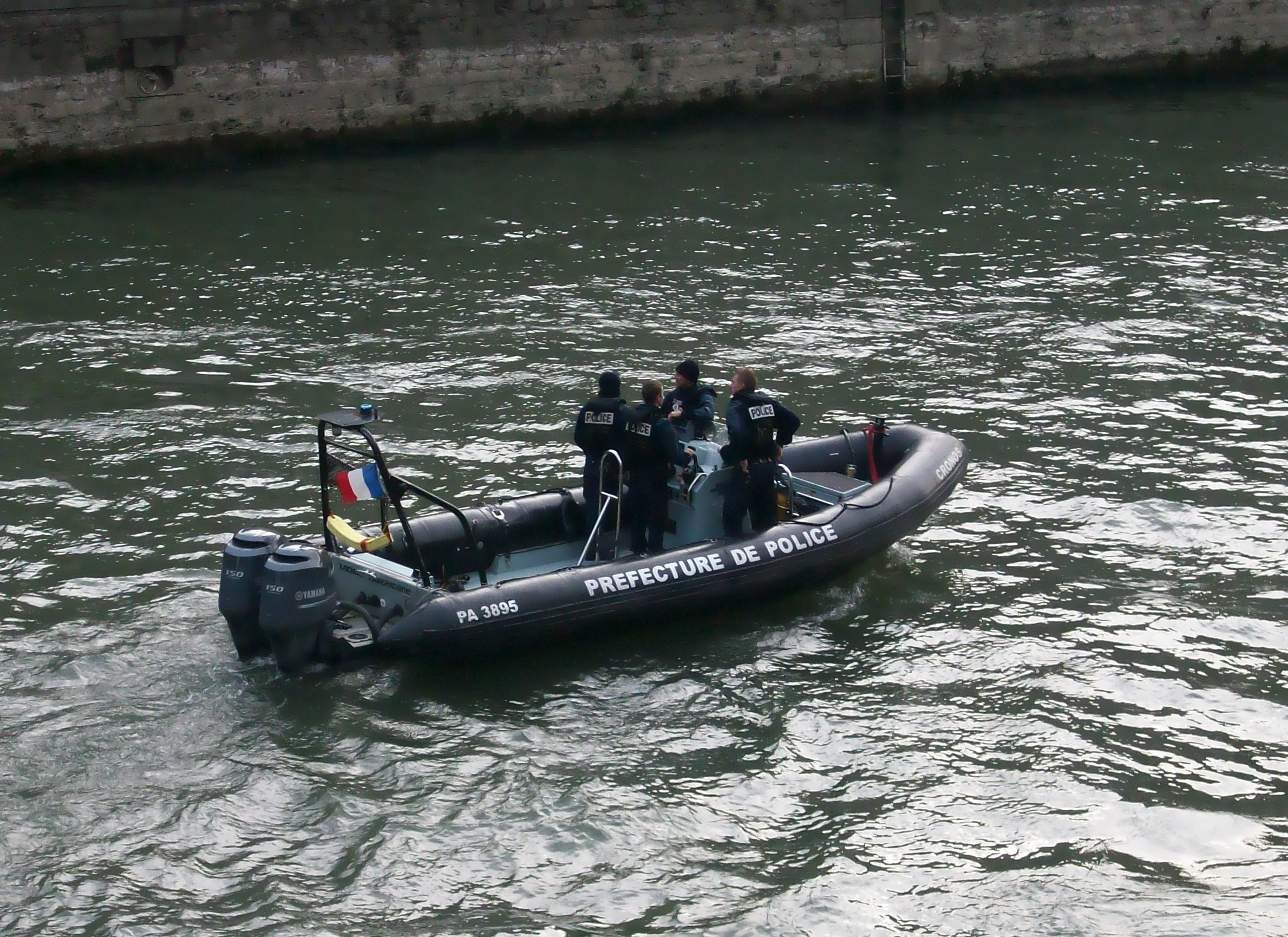 Bateau de la préfecture de Police, à Paris.